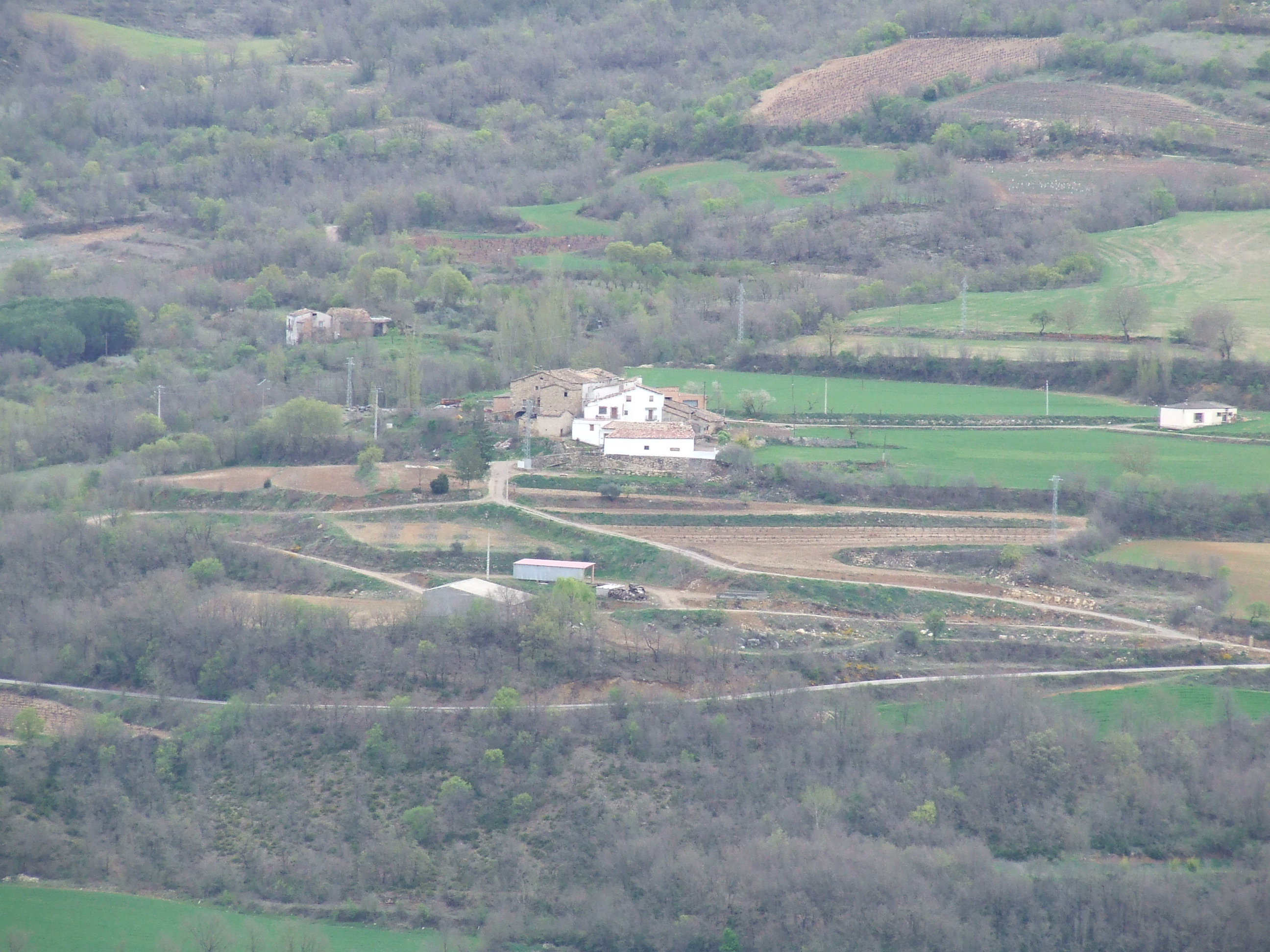 Els Masos de Llimiana, o Mas de Solduga (Llimiana, Pallars Jussà)